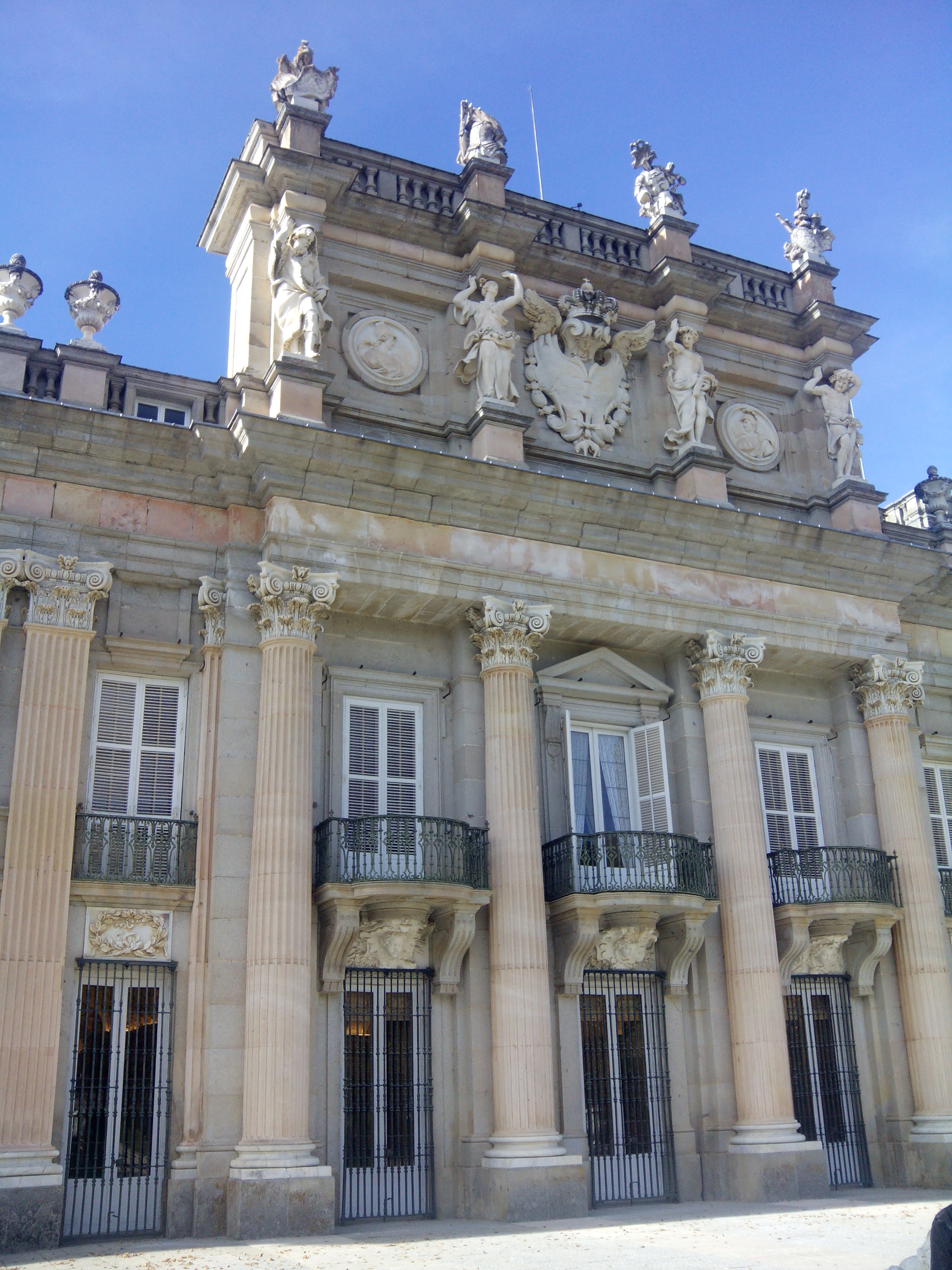 Fachada del palacio, San Ildefonso, Segovia, España, 2014